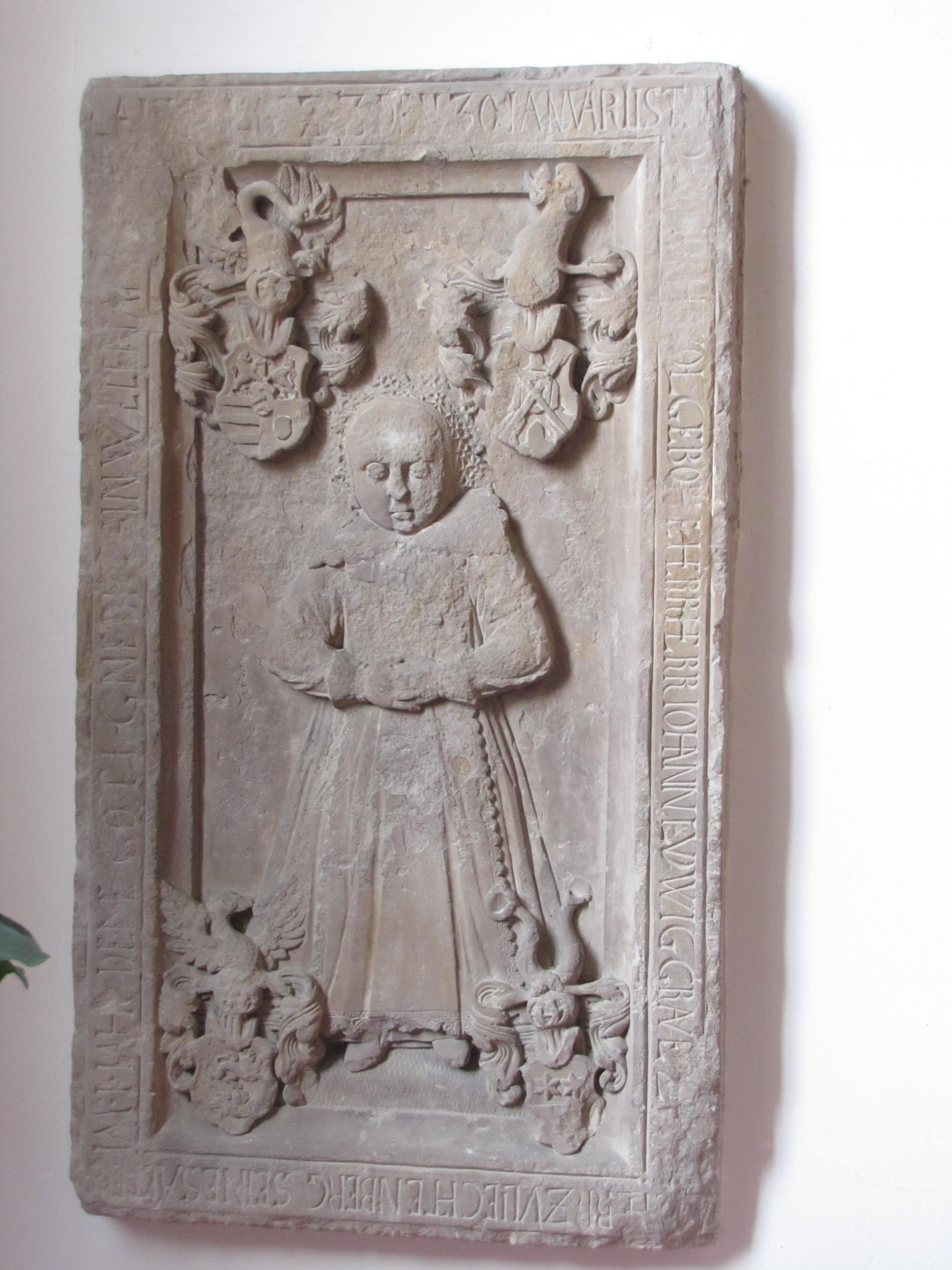 Alsace, Bas-Rhin, Église protestante de Bouxwiller (PA00084645, IA67009578). Pierre tombale de Johann Ludwig de Hanau-Lichtenberg (1621-1623)